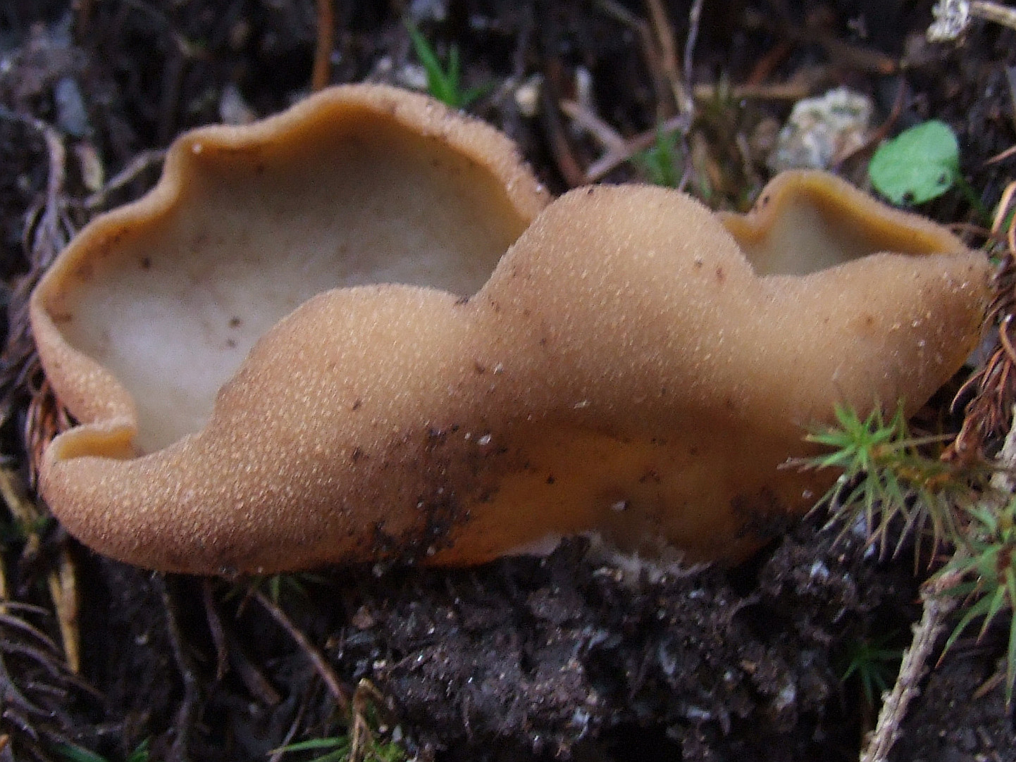 Peziza badia (habitat:Tatra Mountains, Dolina Kieżmarska)